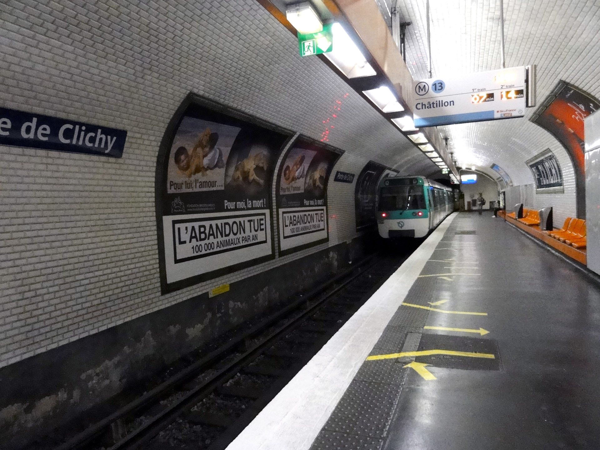 La station Porte de Clichy de la ligne 13 du métro de Paris, France